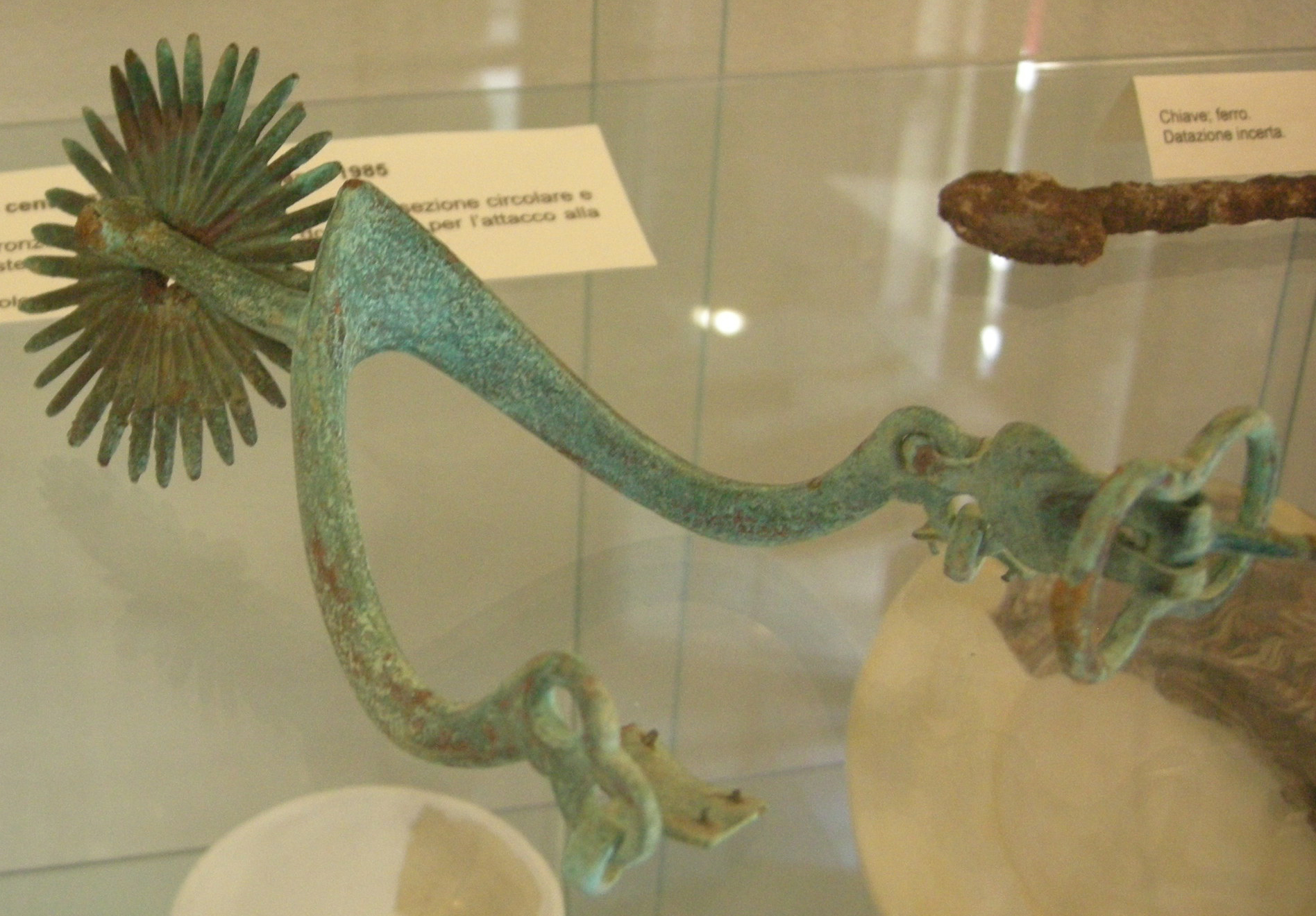 Altopascio, sperone in bronzo del tre-quattrocento